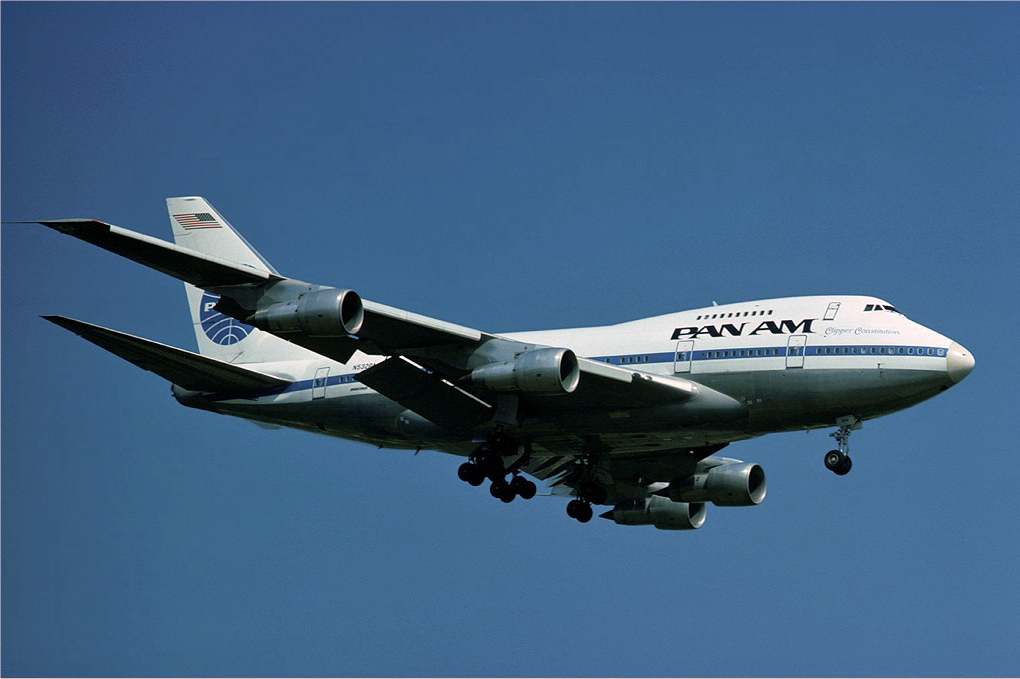 Pan Am Boeing 747SP at LHR